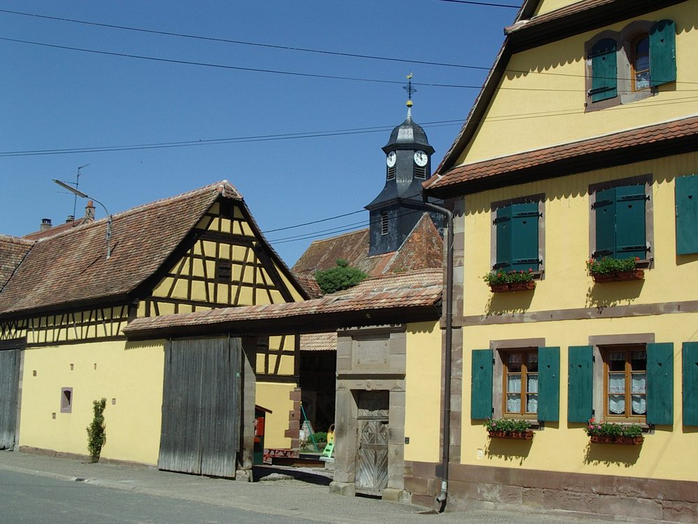 Wickersheim, Bas-Rhin, France